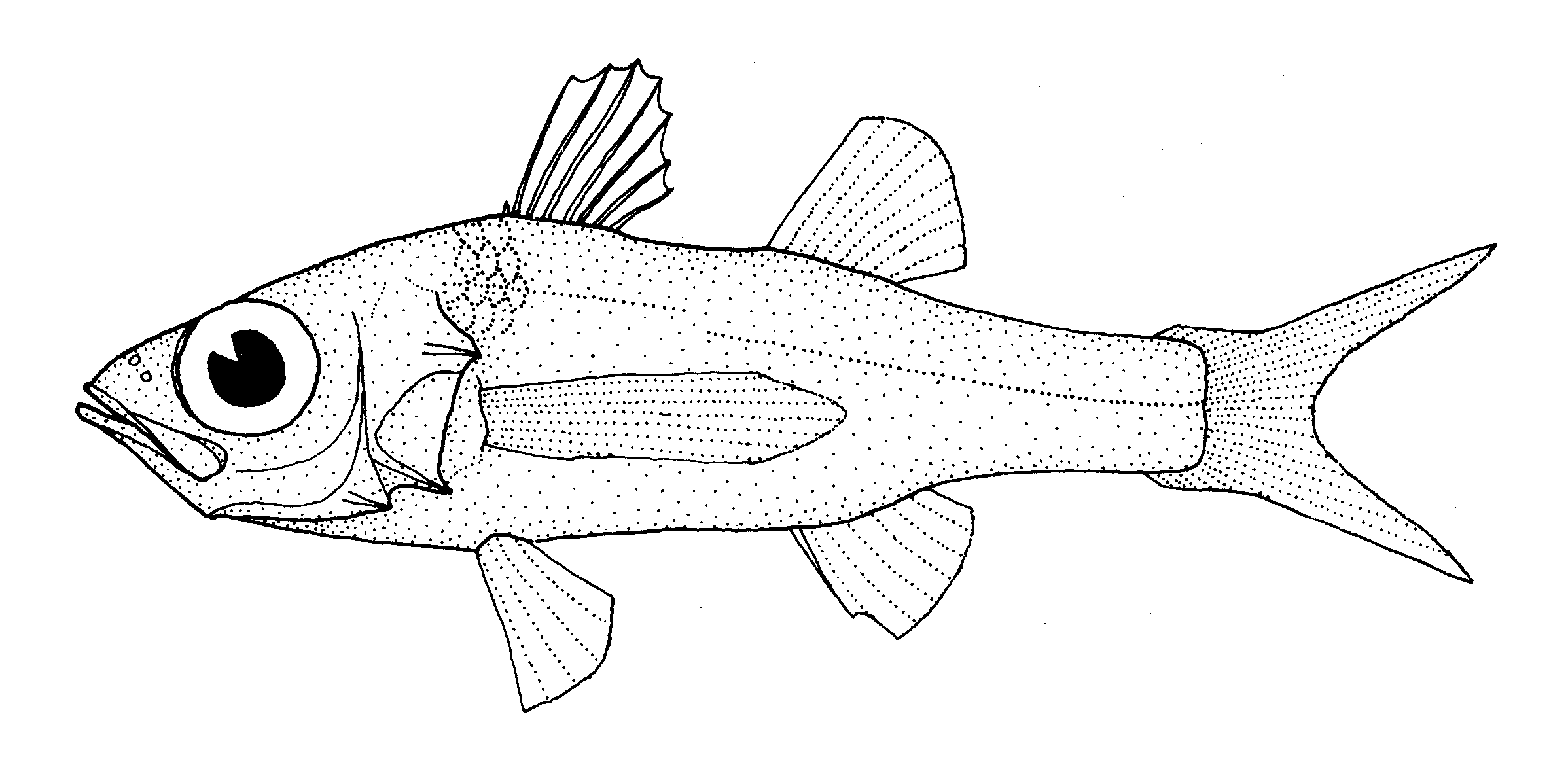 Howella brodiei (Pelagic basslet)